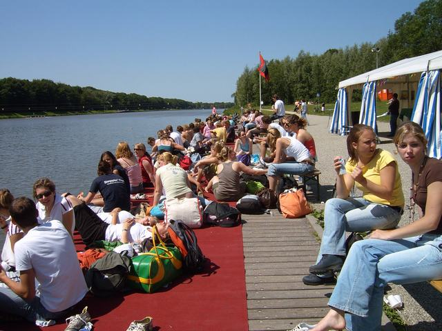 Orca's_Competitie_Slotwedstrijden_en_Bedrijfsachtenregatta